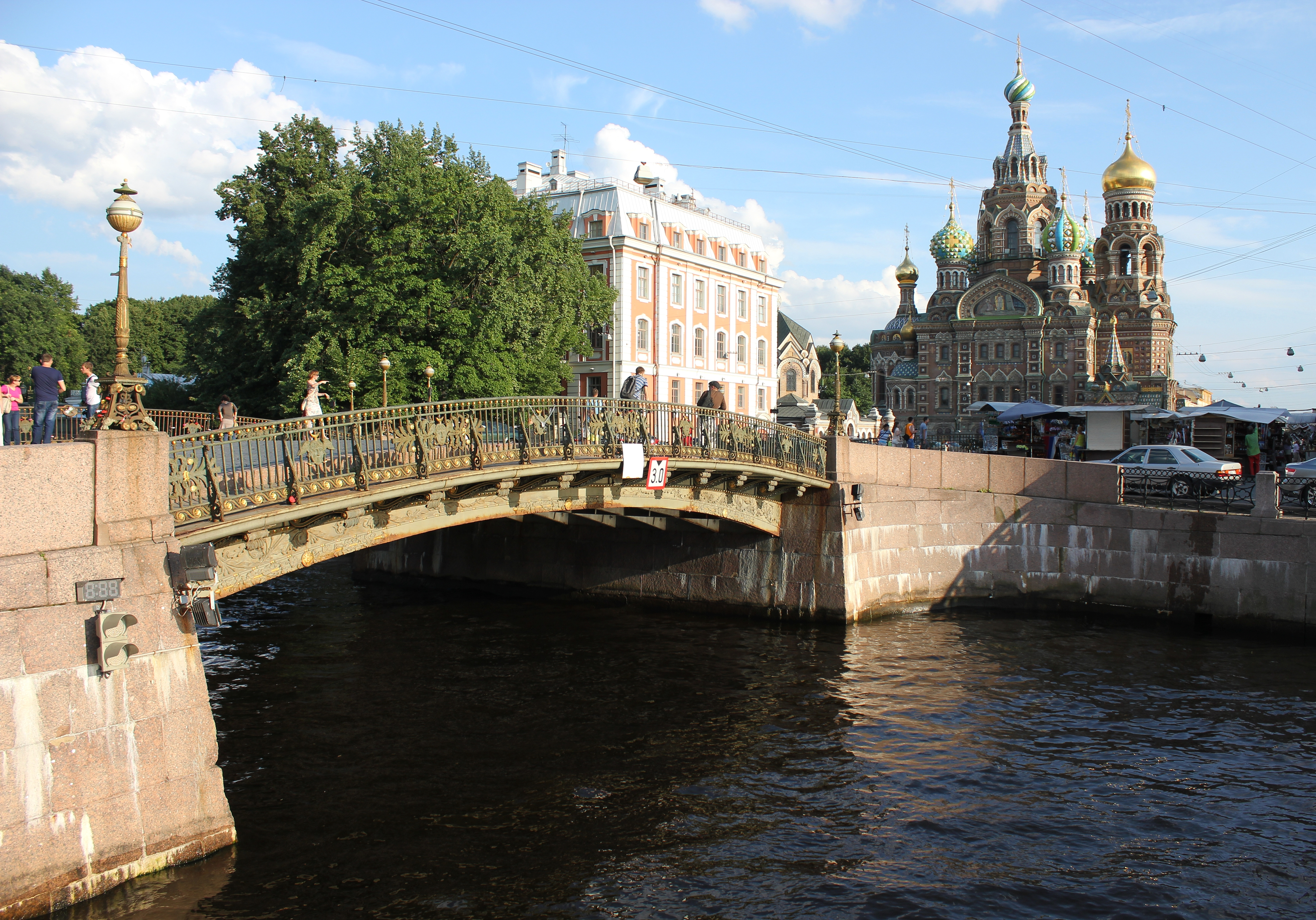 Взгляд на Высшую школу народных искусств (слева) и собор Воскресения Христова ("Спас на крови") (справа) с набережной реки Мойки. Санкт-Петербург. На переднем плане Малый Конюшенный мост.